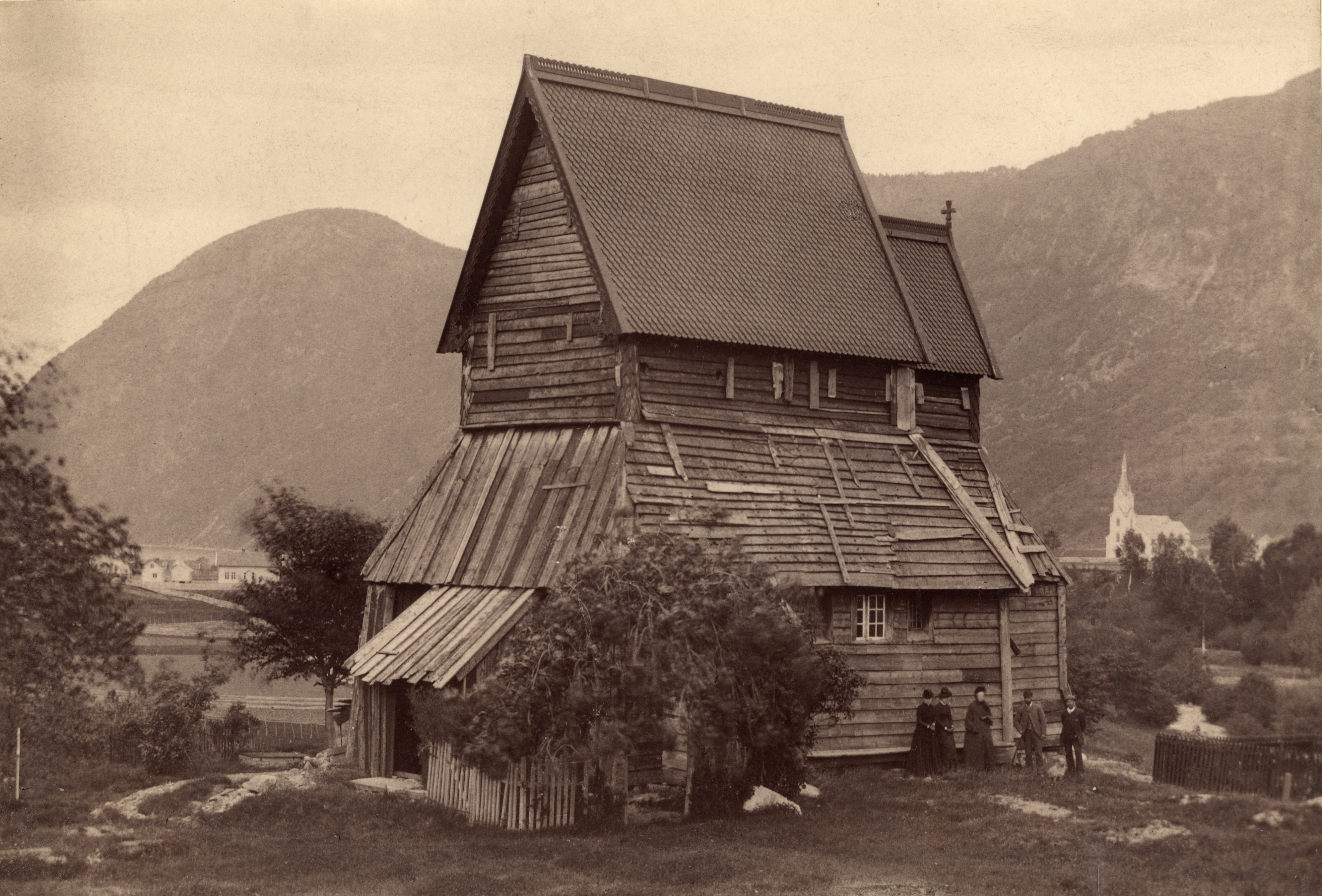 Hopperstad stavkirke, Hoprekstad stavkirke i Vik, Sogn og Fjordane Fra restaureringsarbeidet 1885-1891.